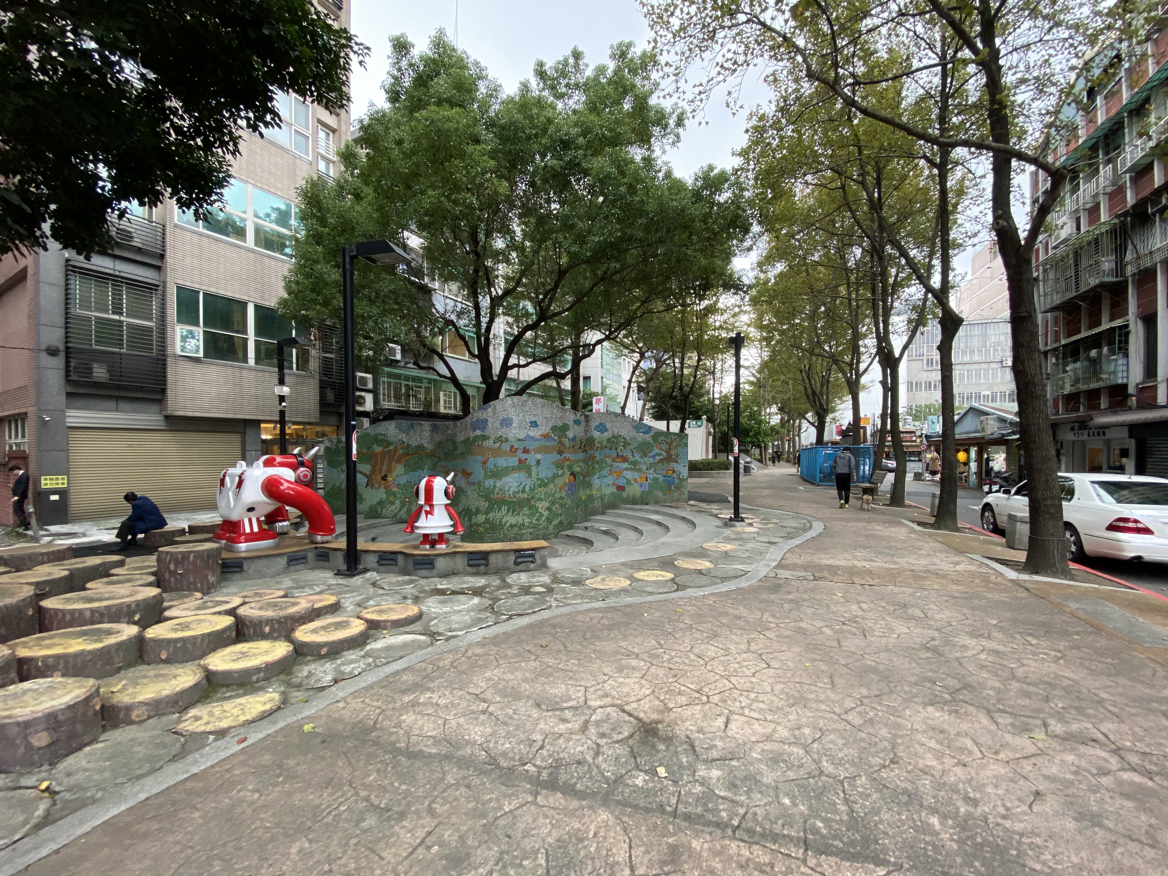 中文（台灣）: 台北捷運中山站與長安西路之間地面廣場設公共藝術作品